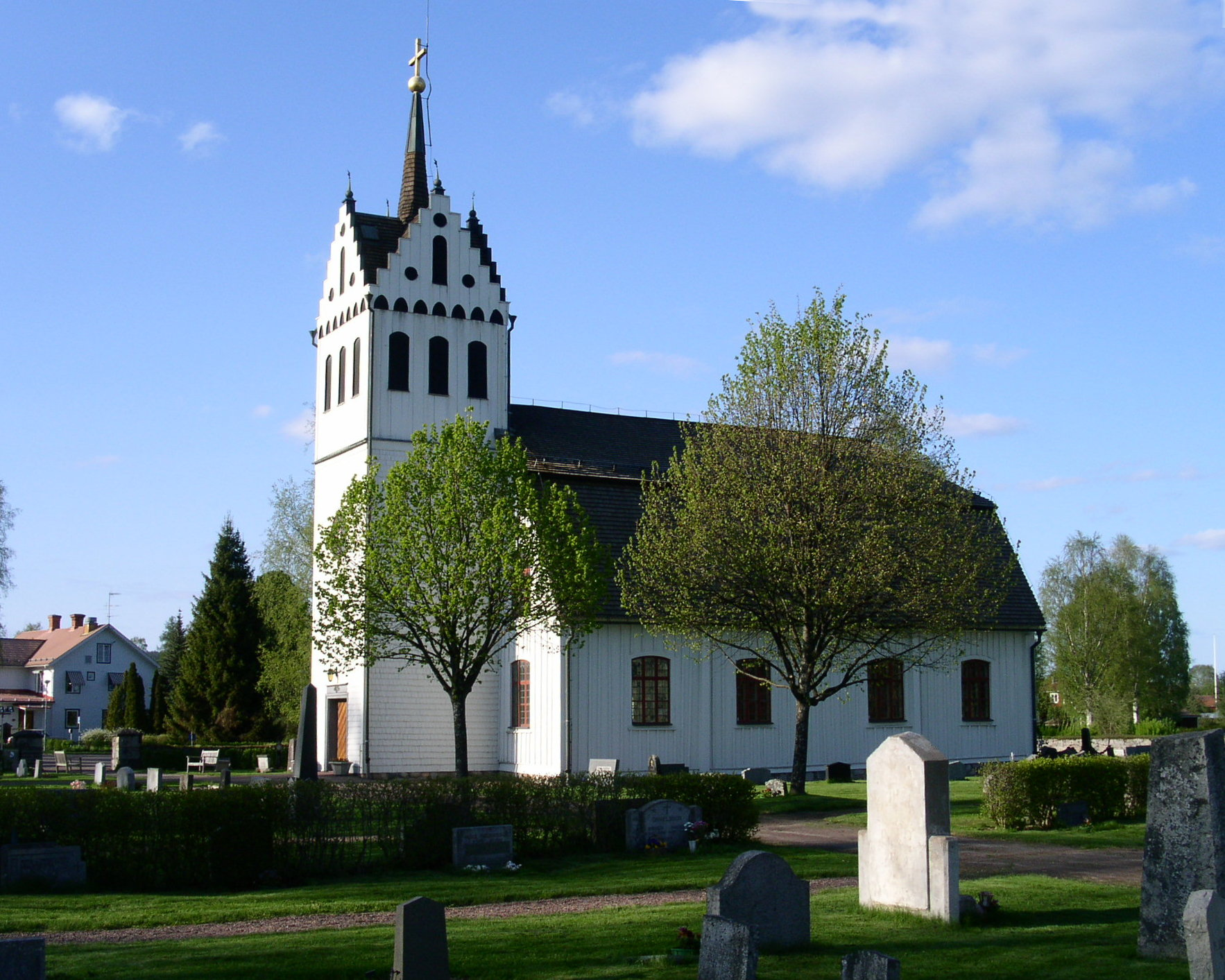 Mockfjärds kyrka från sydsydväst